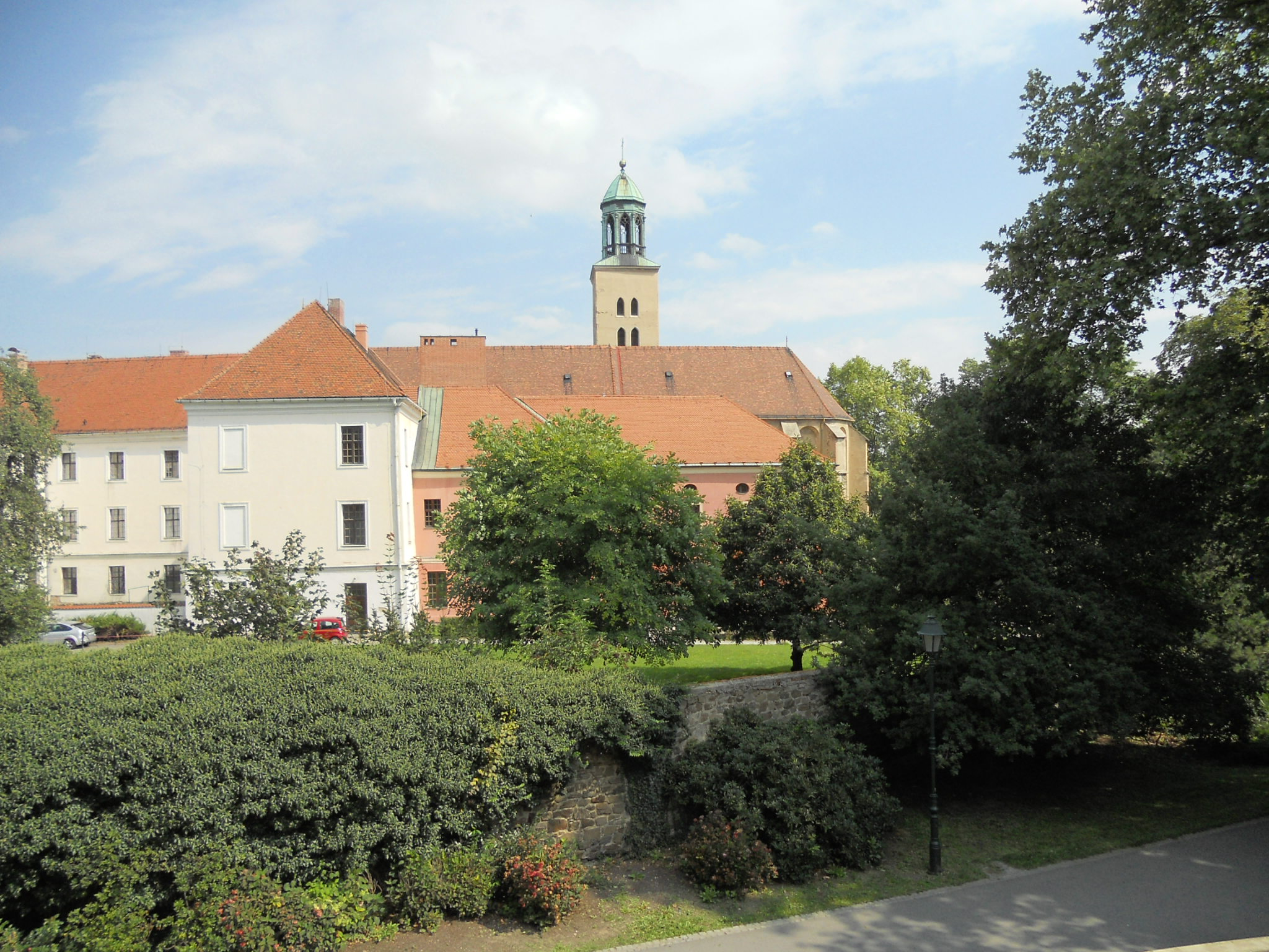 Minoritský klášter